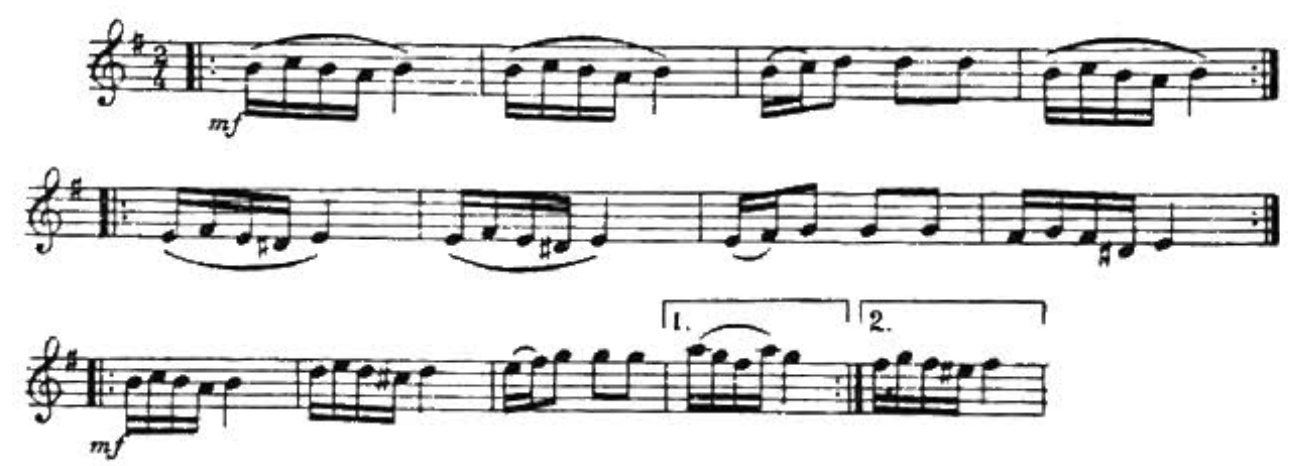 Ноты отрывка танца кочари из Энциклопедического музыкального словаря 1959